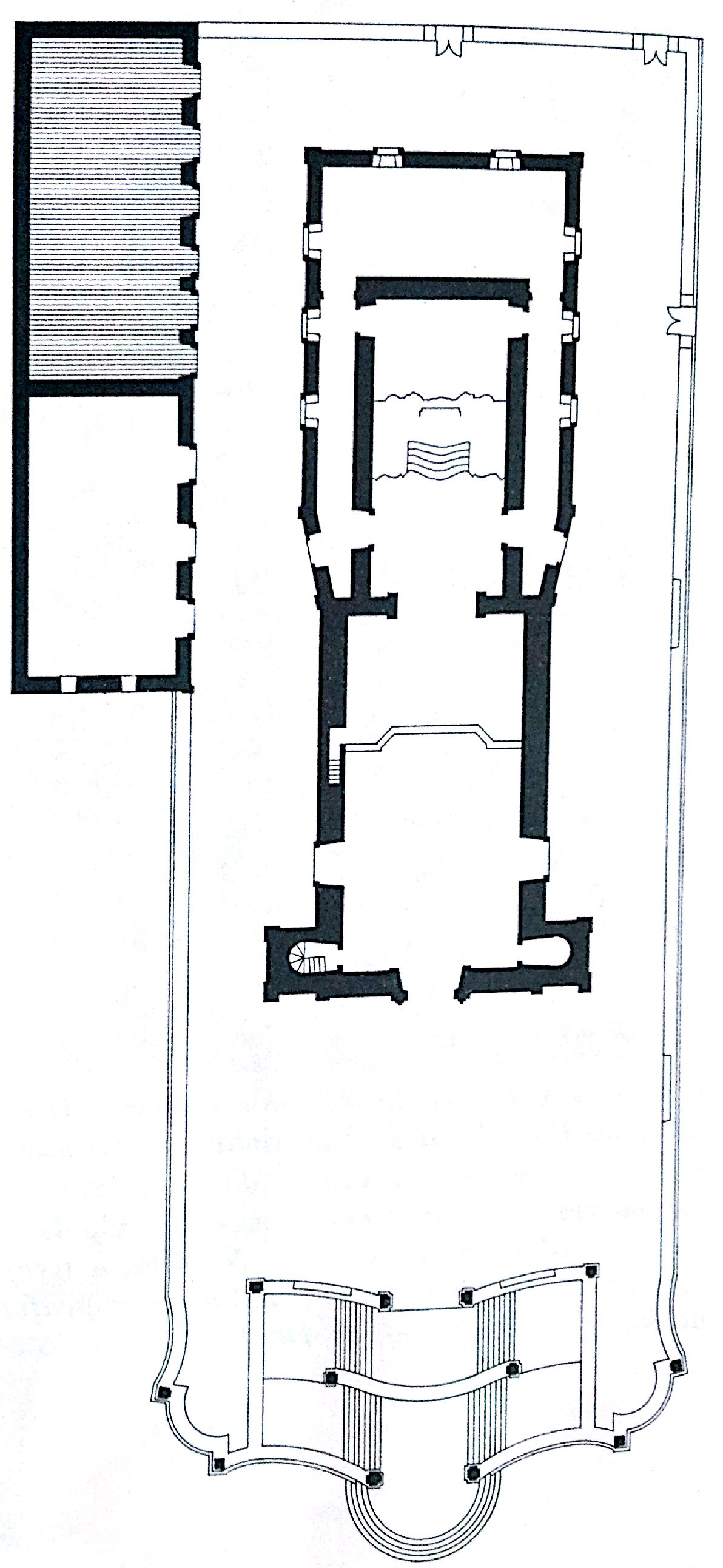 Planta _ santuario do bom jesus de matozinhos